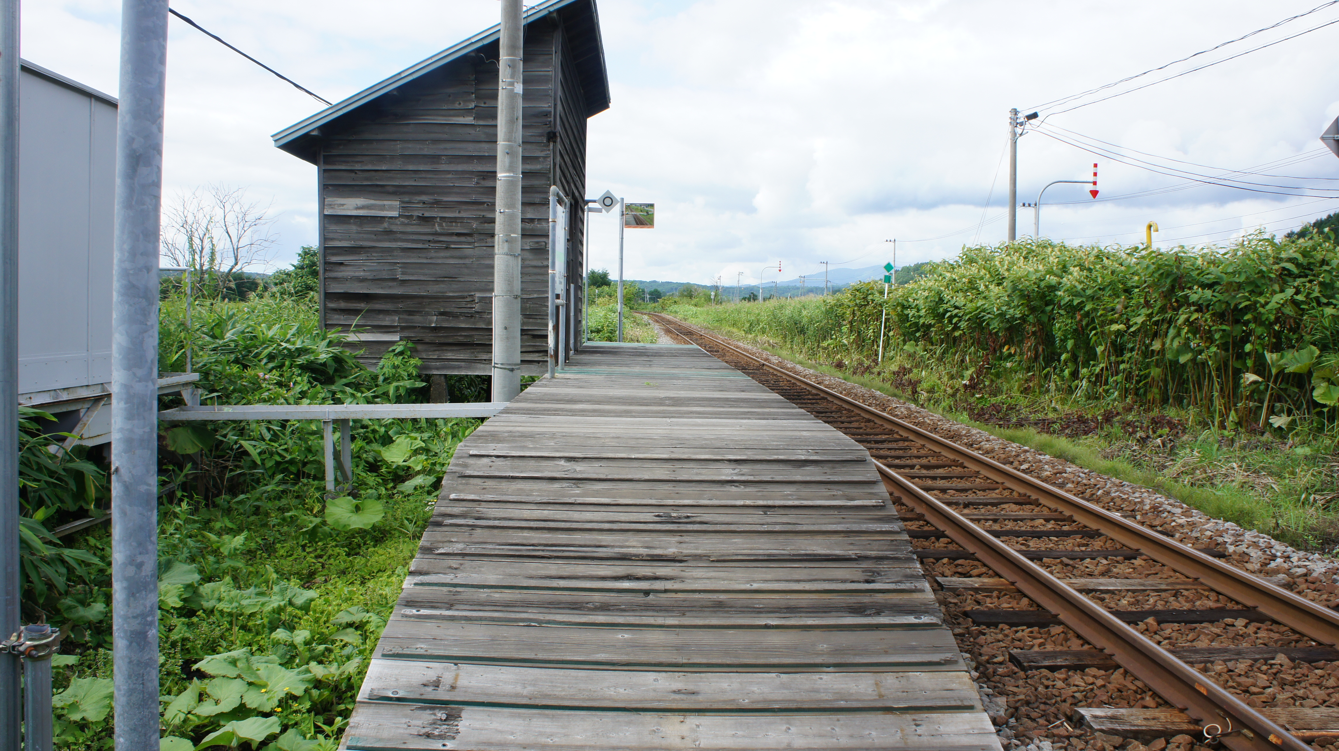 JR留萌本線・真布駅のホーム